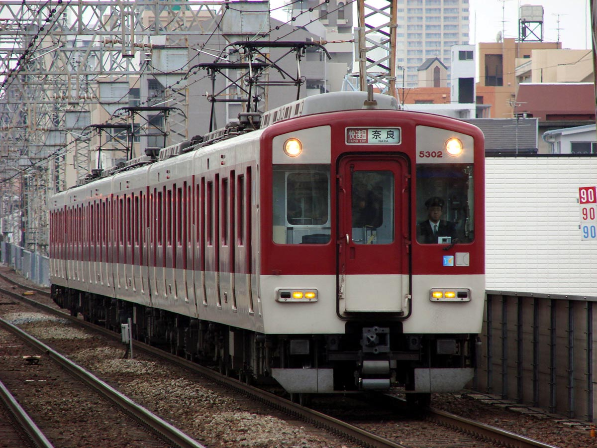 近鉄 5800系